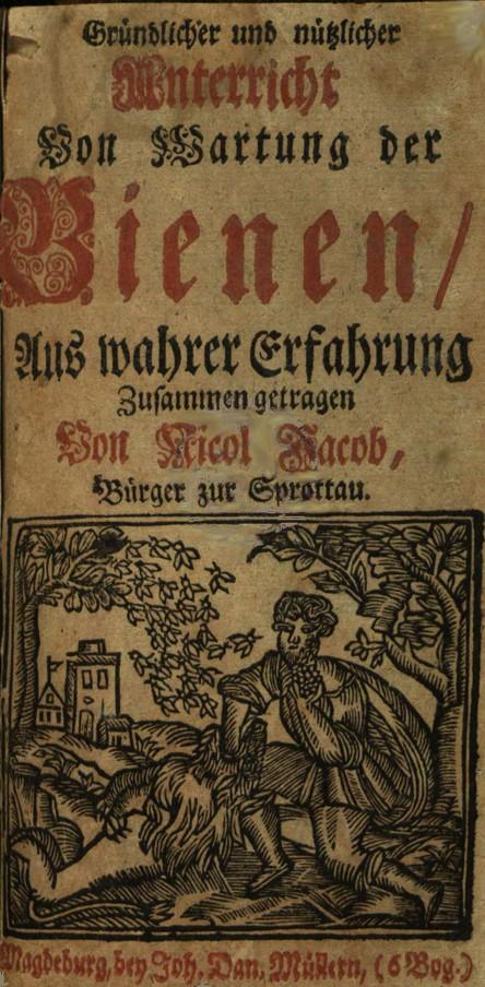 Titelblatt des ersten deutschen Bienenbuchs von Nickel Jacob, Erstausgabe 1568